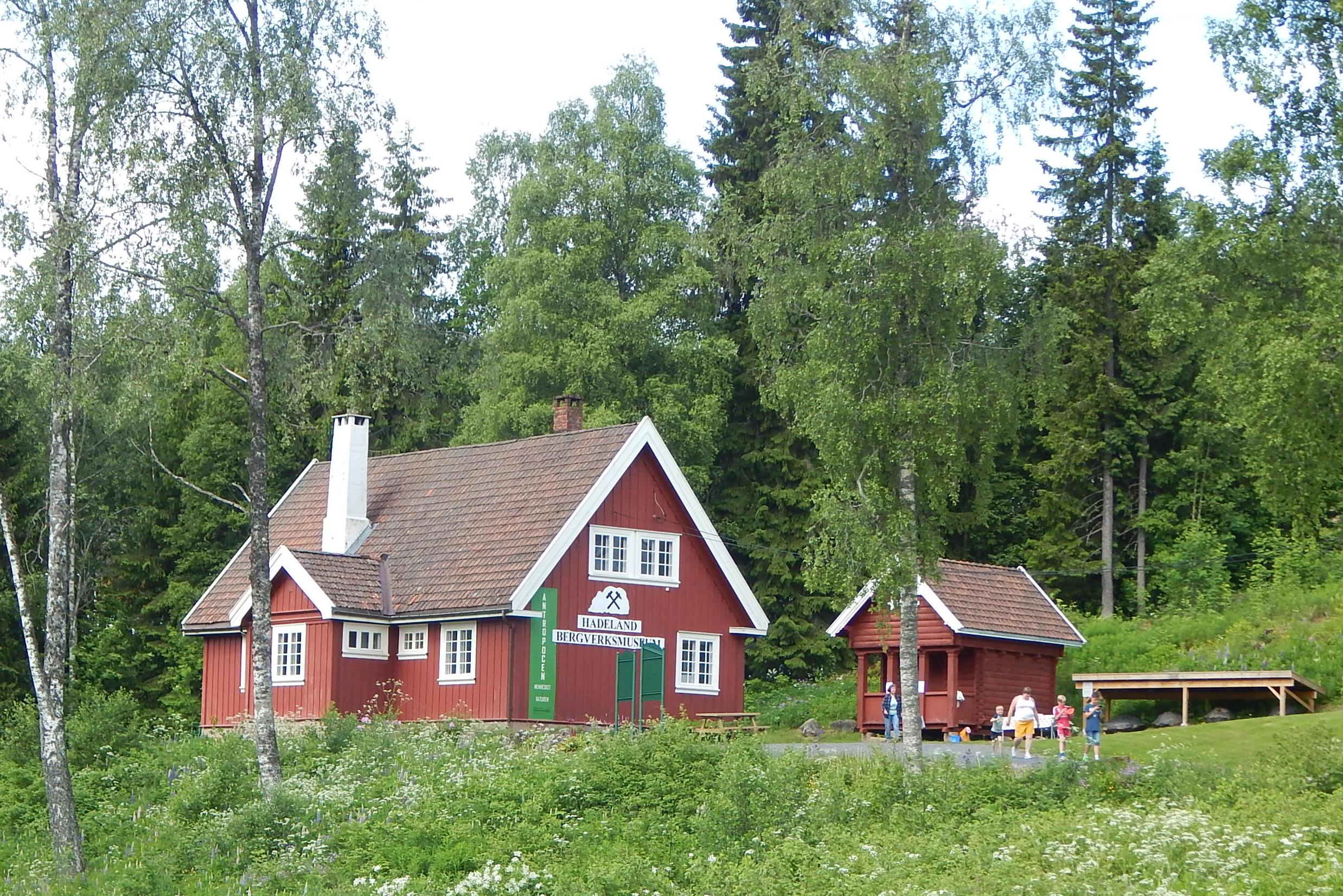 Hadeland bergverksmuseum utenfor Grua i Lunner